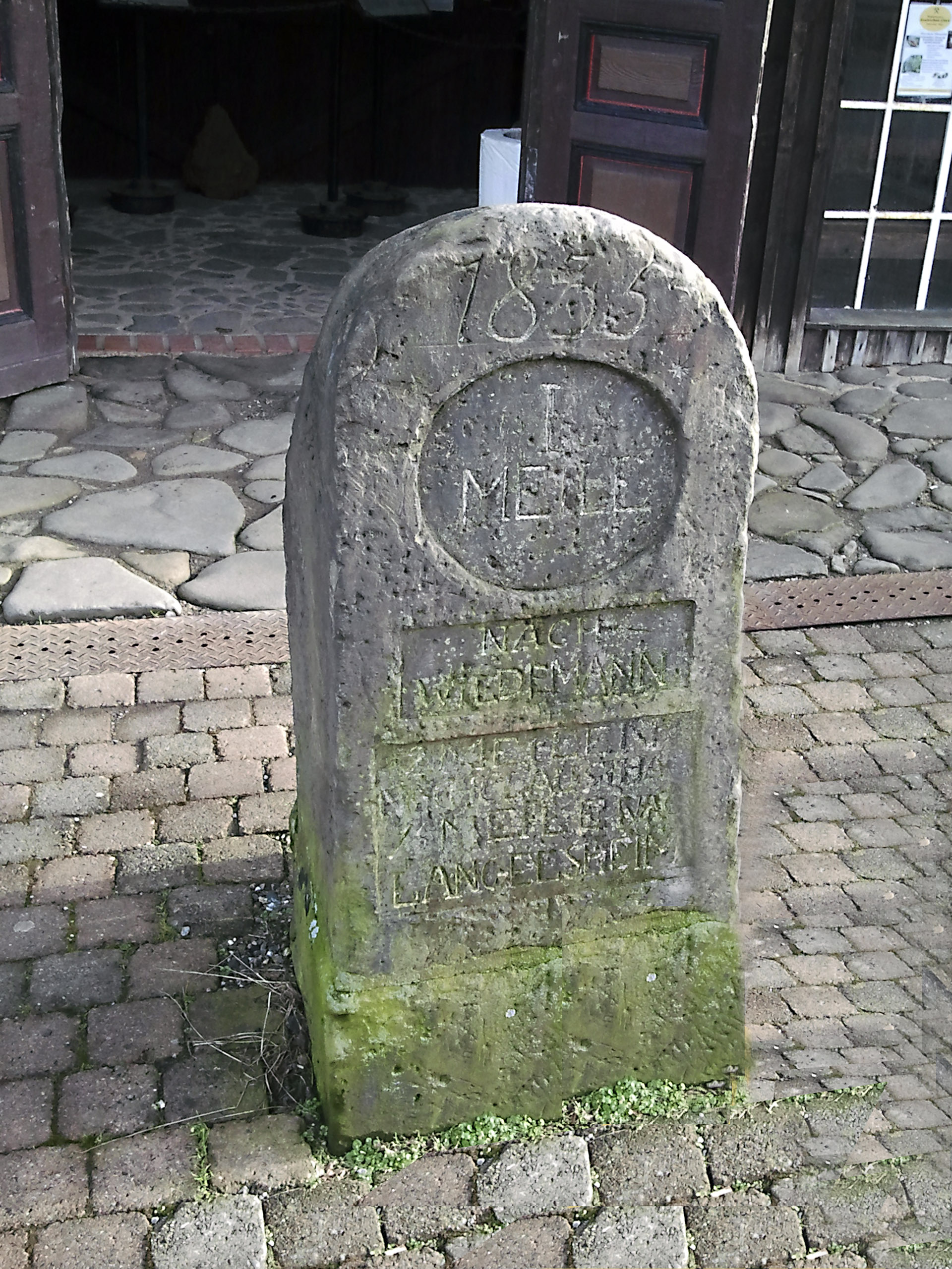 Postmeilenstein vor dem "Bergwerksmuseum Lautenthals Glück" in Lautenthal